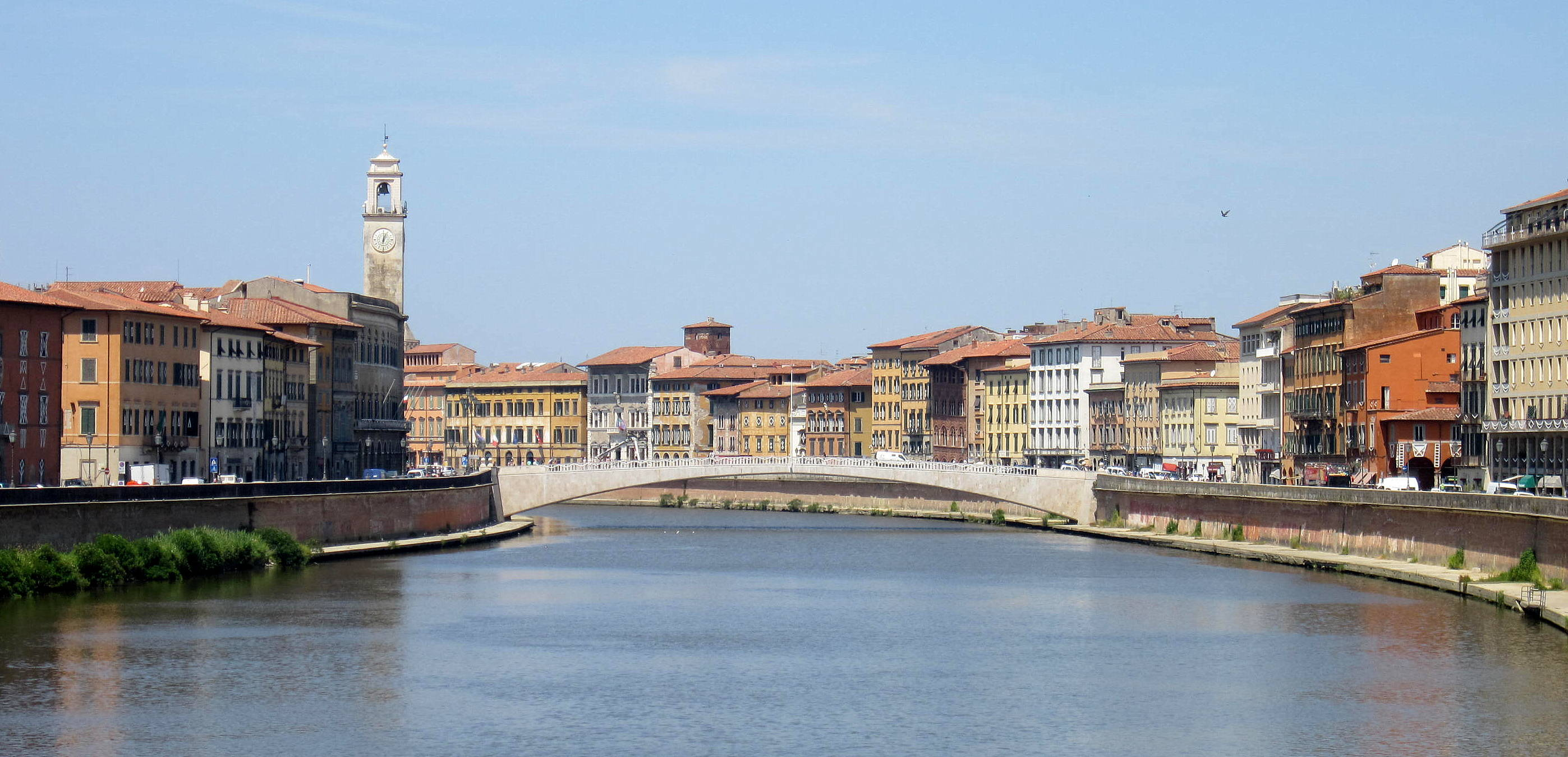 Lungarno Galilei e Lungarno Mediceo a Pisa